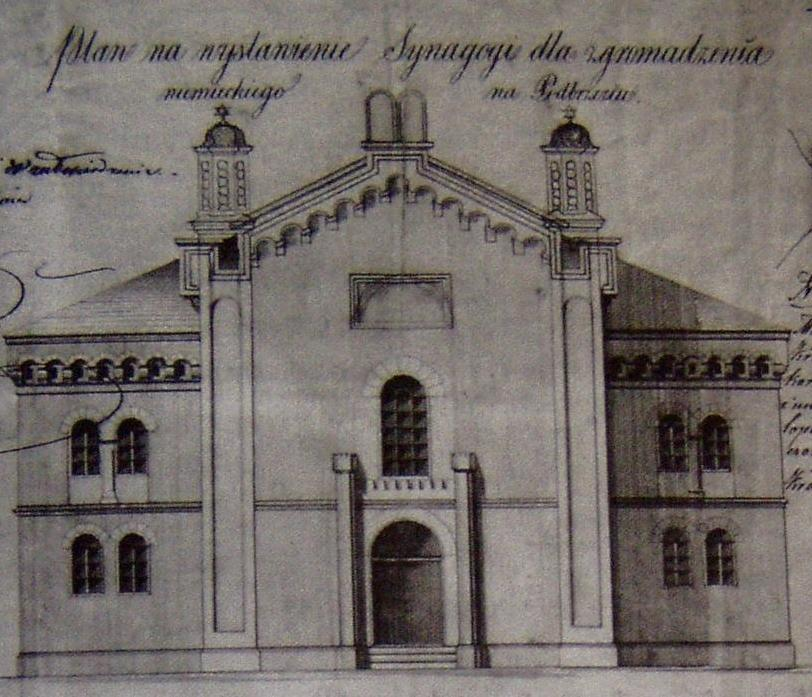 Projekt synagogi Tempel w Krakowie, 1860